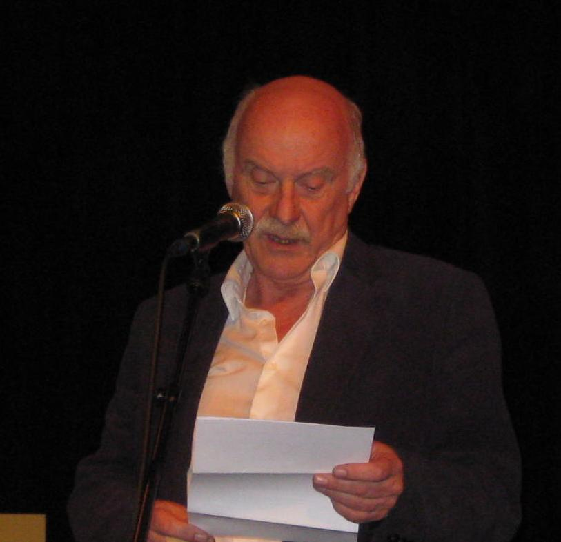 Jan Donkers bij de presentatie van het boek Keihard & Swingend, de beginjaren van Muziekkrant OOR